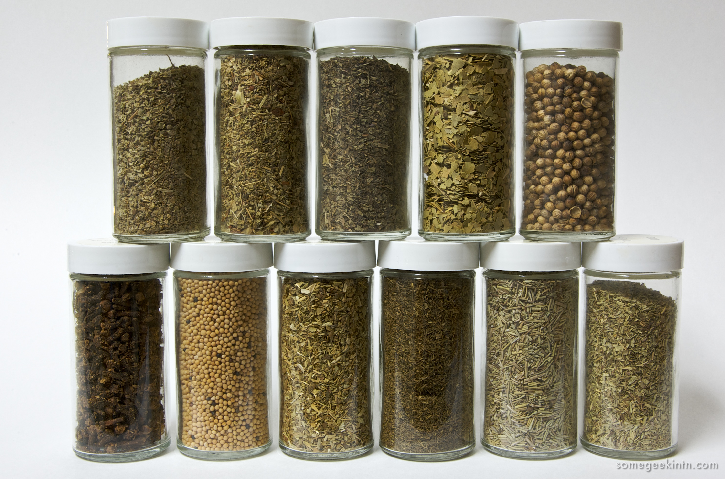 Eleven Herbs & Spices (86 / 365)